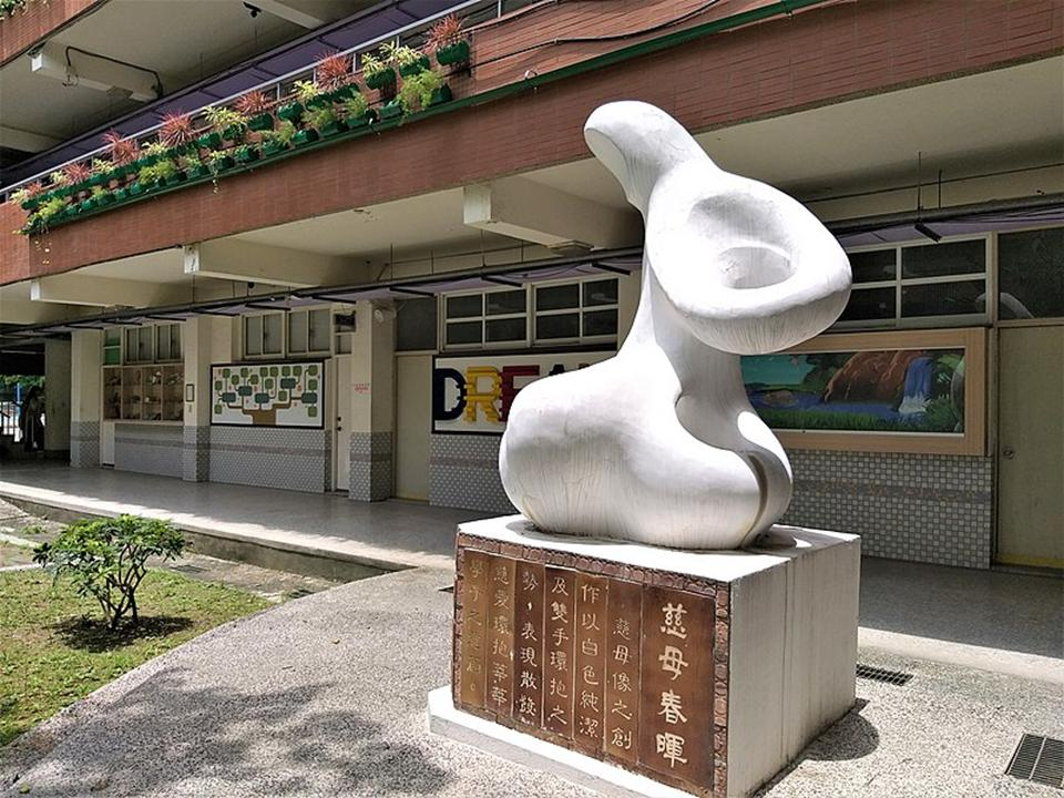 中文（台灣）: 臺北市立新興國民中學為成立於1968年，校址臺北市中山區林森北路511號是行天宮舊址。新興國中以網球成績出眾而知名。校園內純白的慈母春暉雕塑表現對母愛偉大的重視。